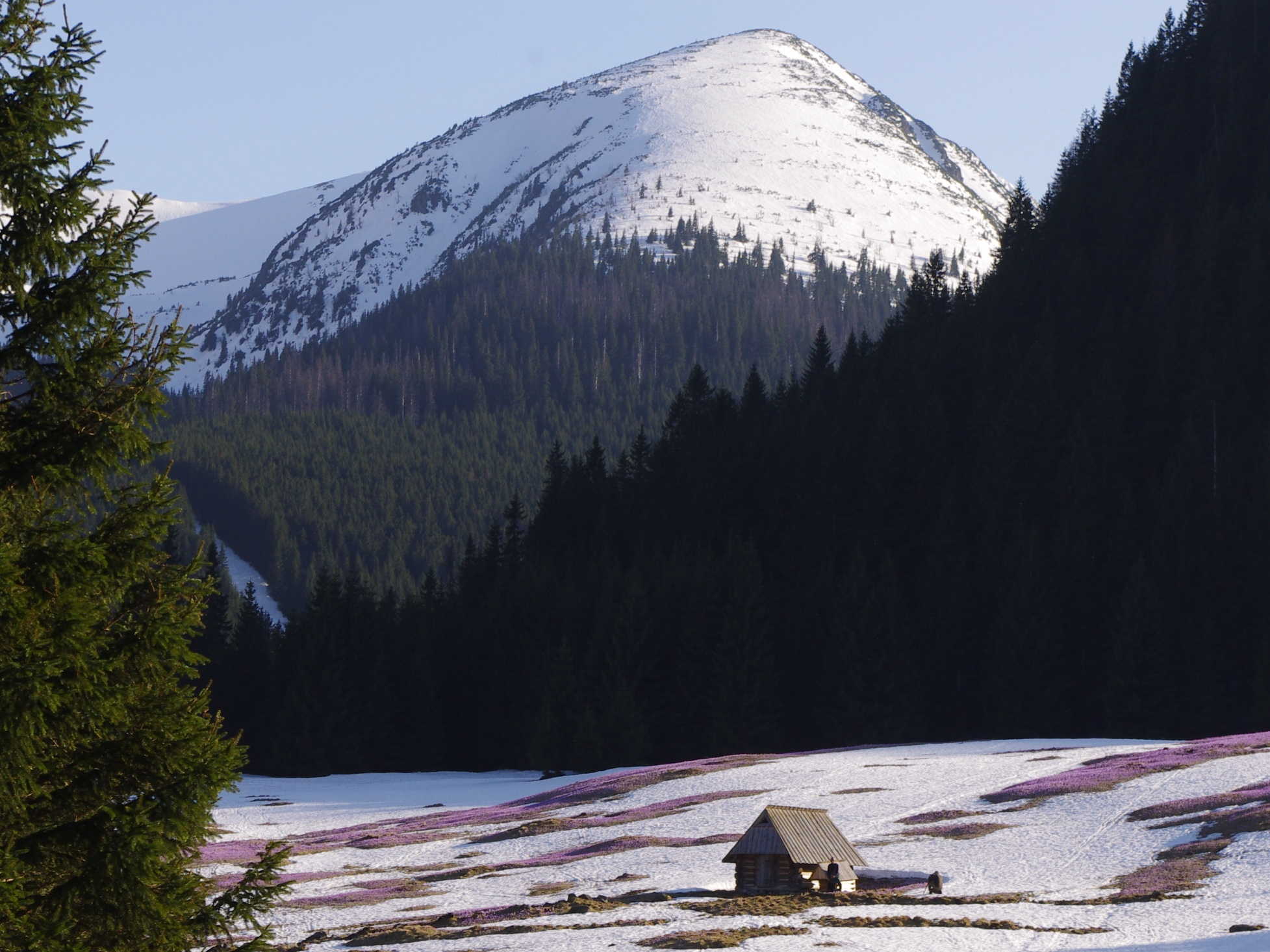 Kondratowy Wierch, widok z Kalatówek